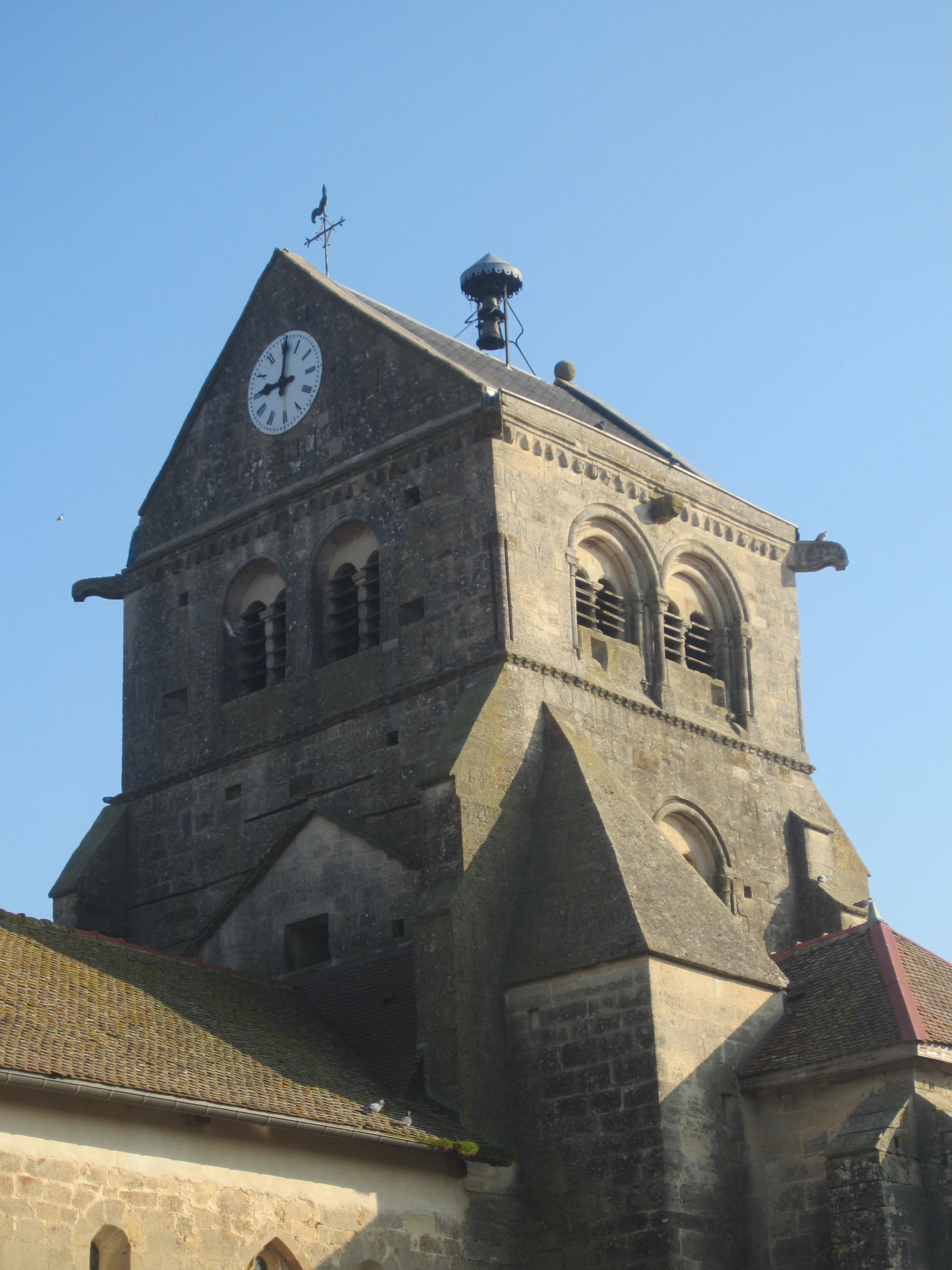 La base du clocher, couvert d'une bâtière à versants bien incliné; il est souligné par de vigoureuses moulures, et orné de petites cloches qui annoncent les heures..., et d'un coq girouette.